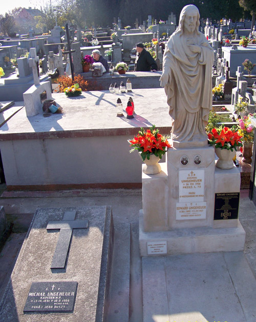 Grób Edwarda Ungeheue